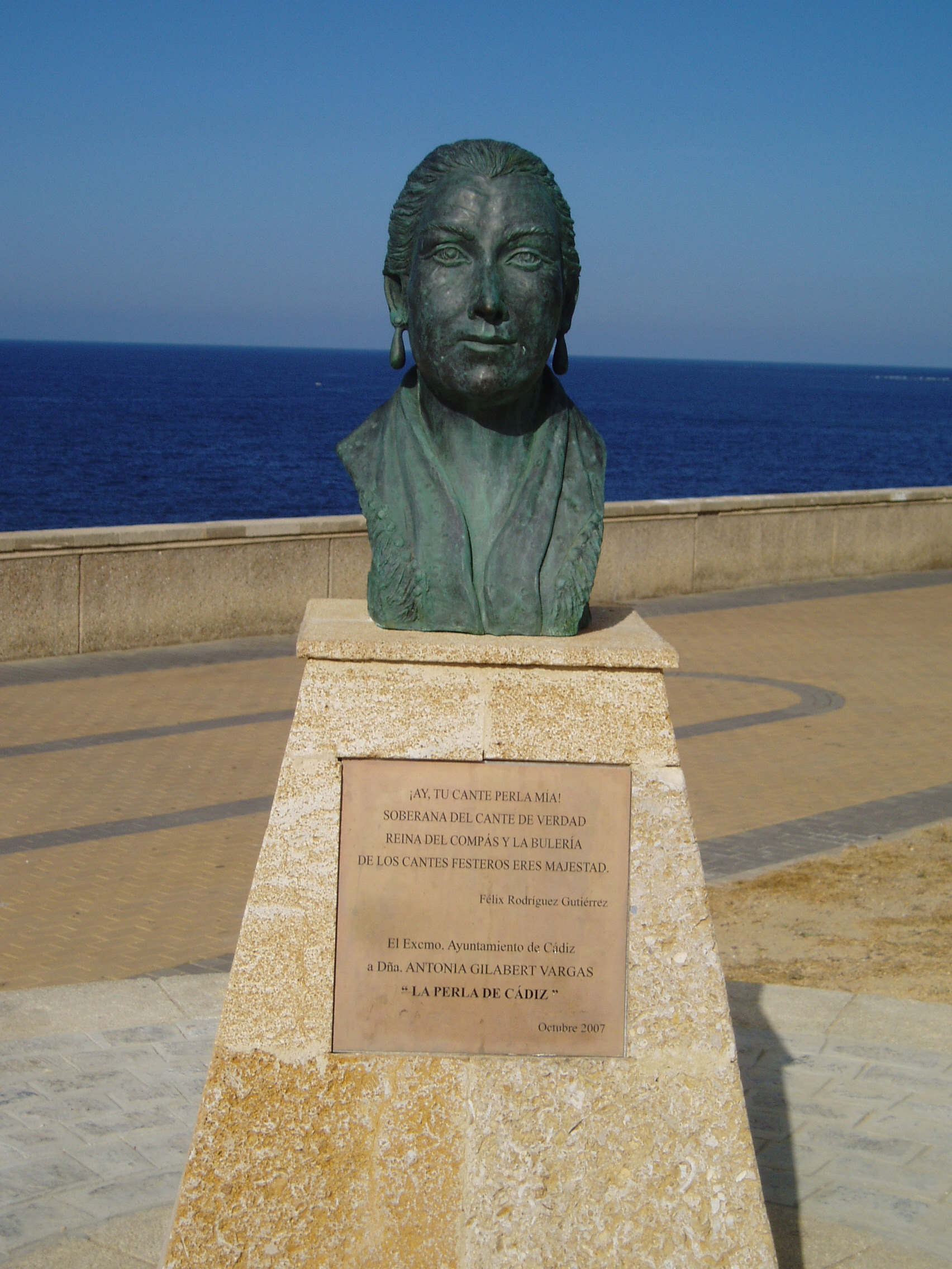 Busto dedicado a la cantaora de flamenco Antonia Gilabert Vargas La Perla de Cádiz (Cádiz 1925-1975) en Cádiz, España.